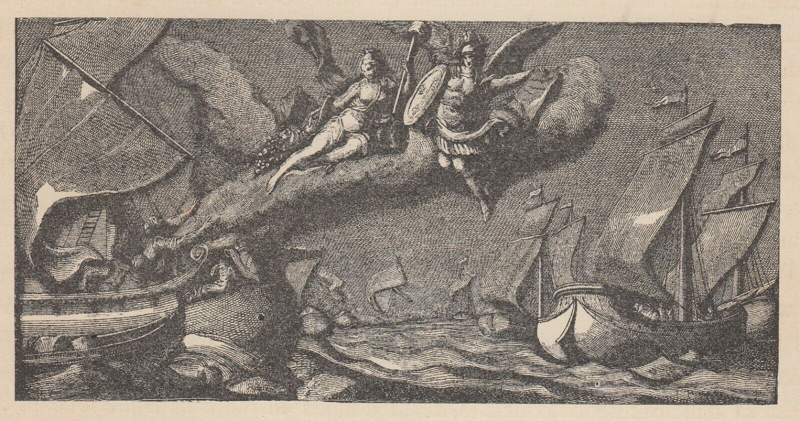 Allegoria - La Libertà del Commercio - 1890 xilografia